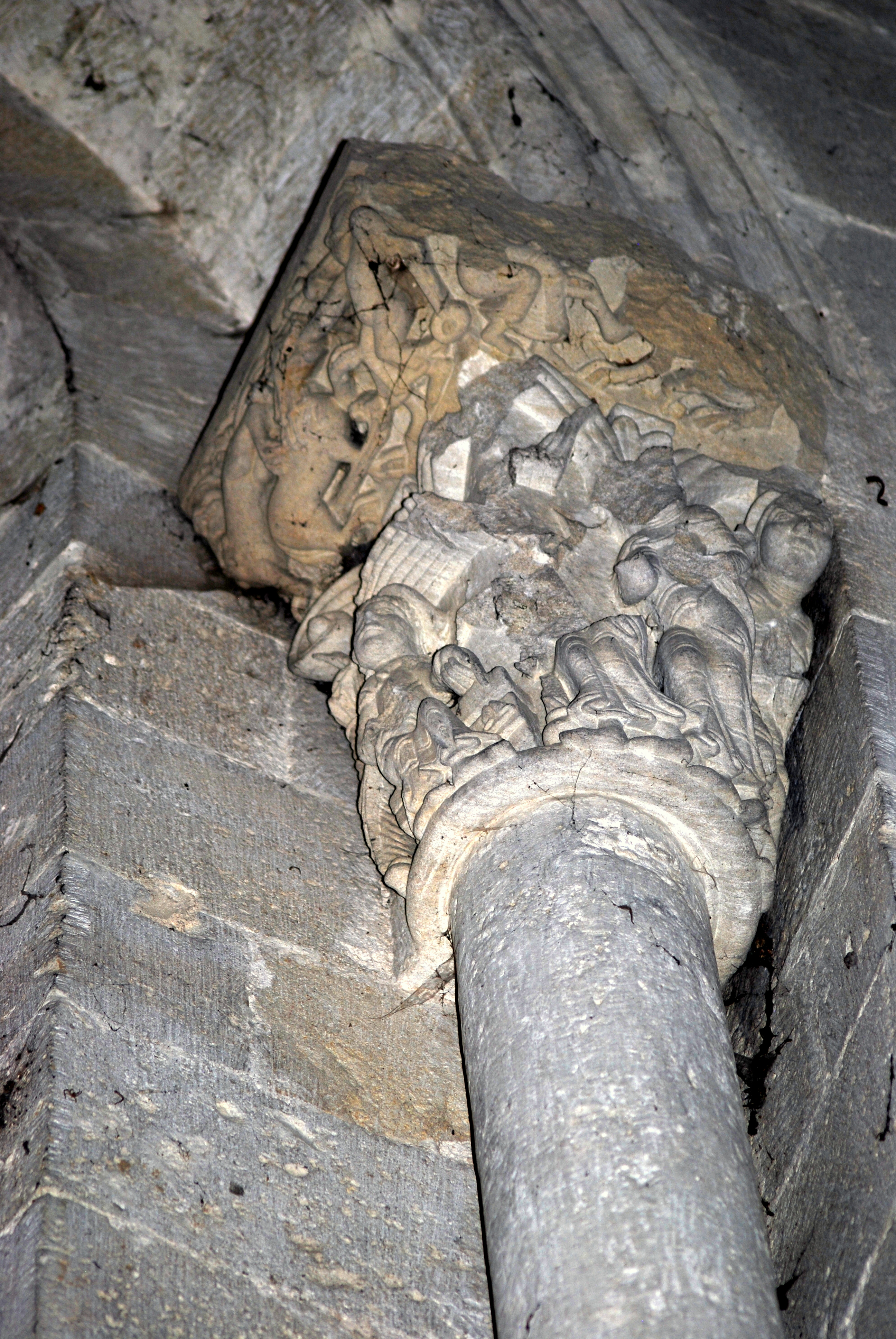 Chapiteaux de l'abbaye de Saint-Ferme